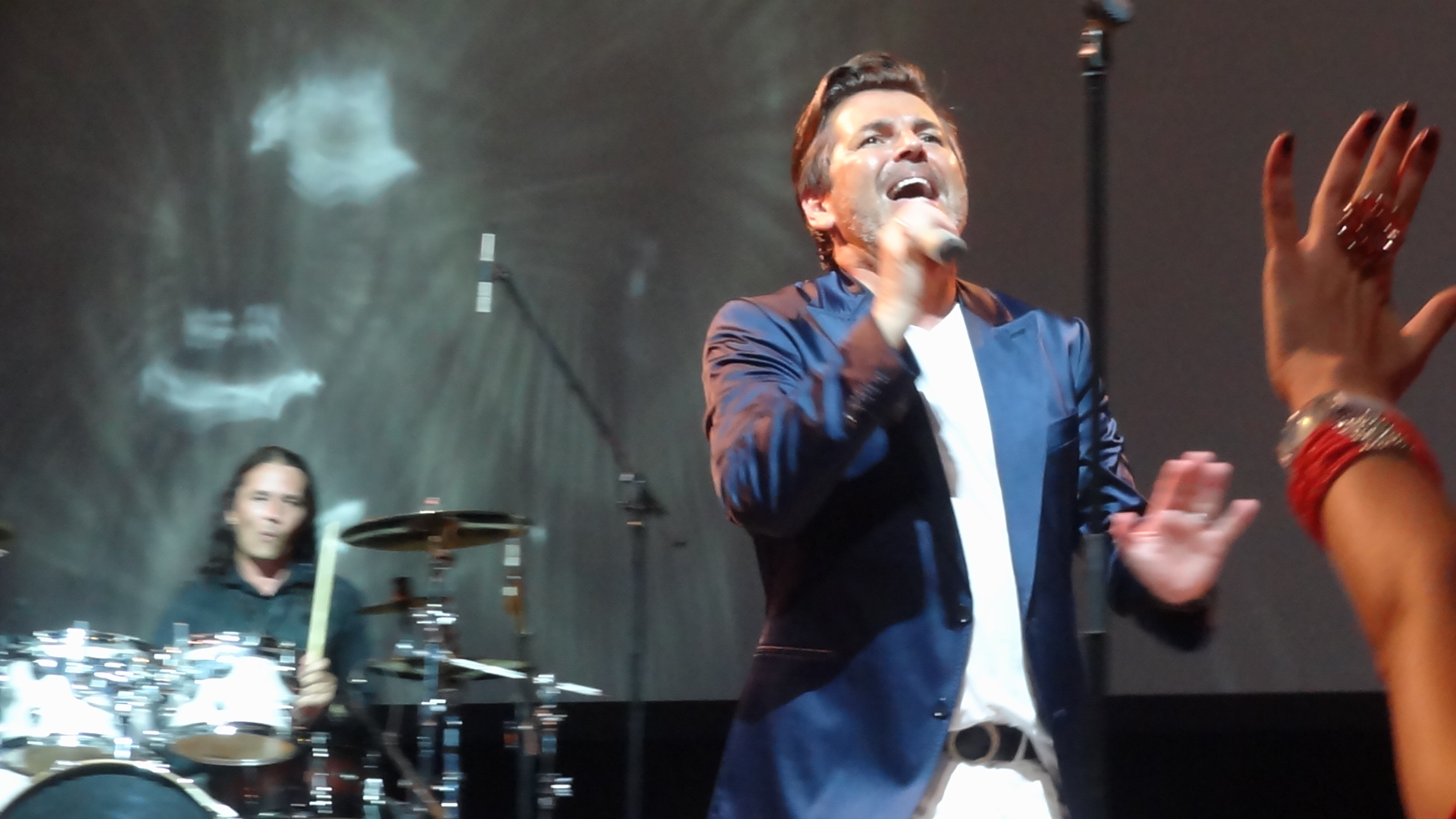 Концерт Томаса Андерса в Сочи.